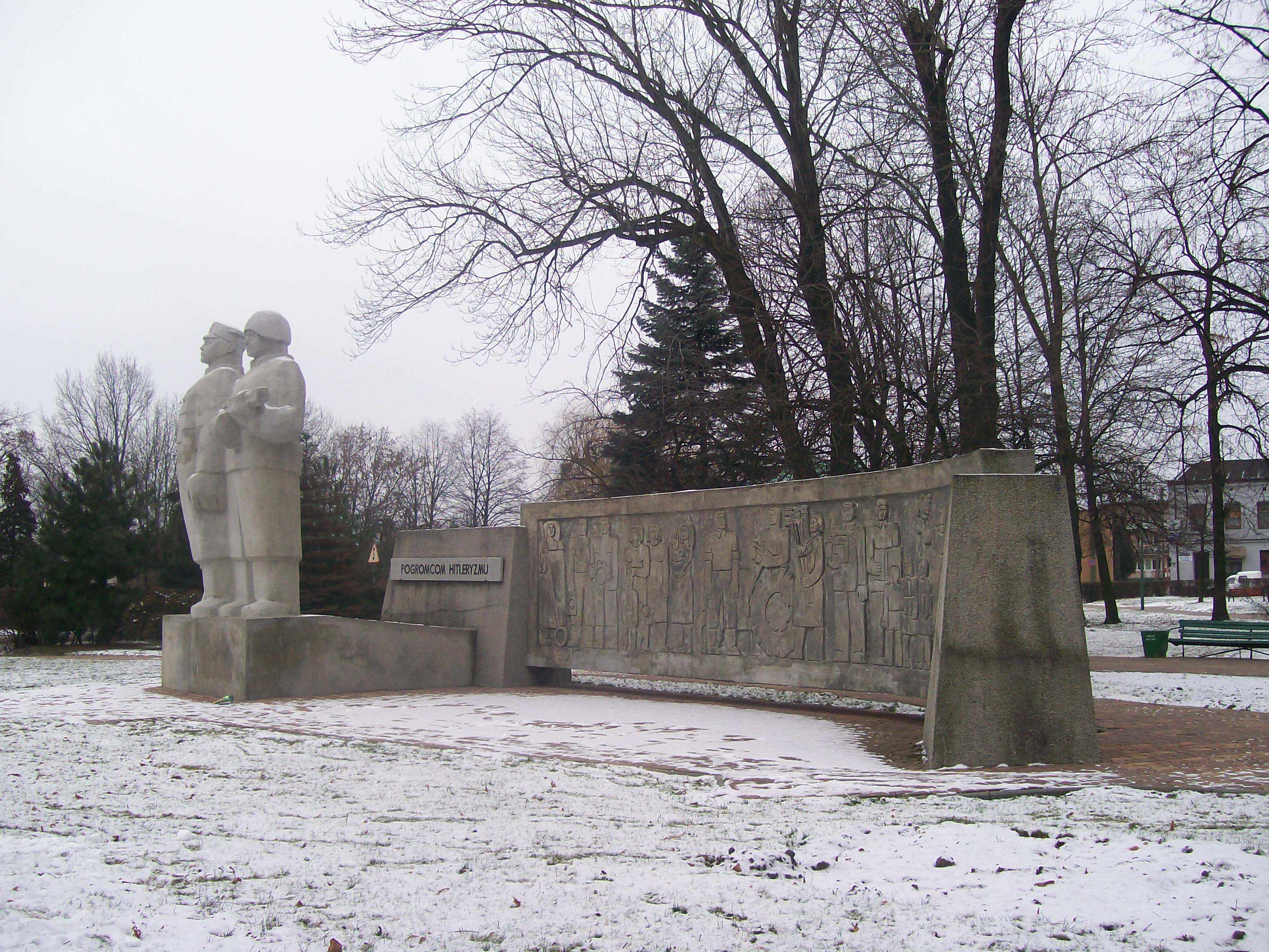 socrealistyczny pomnik "Pogromcom hitleryzmu"